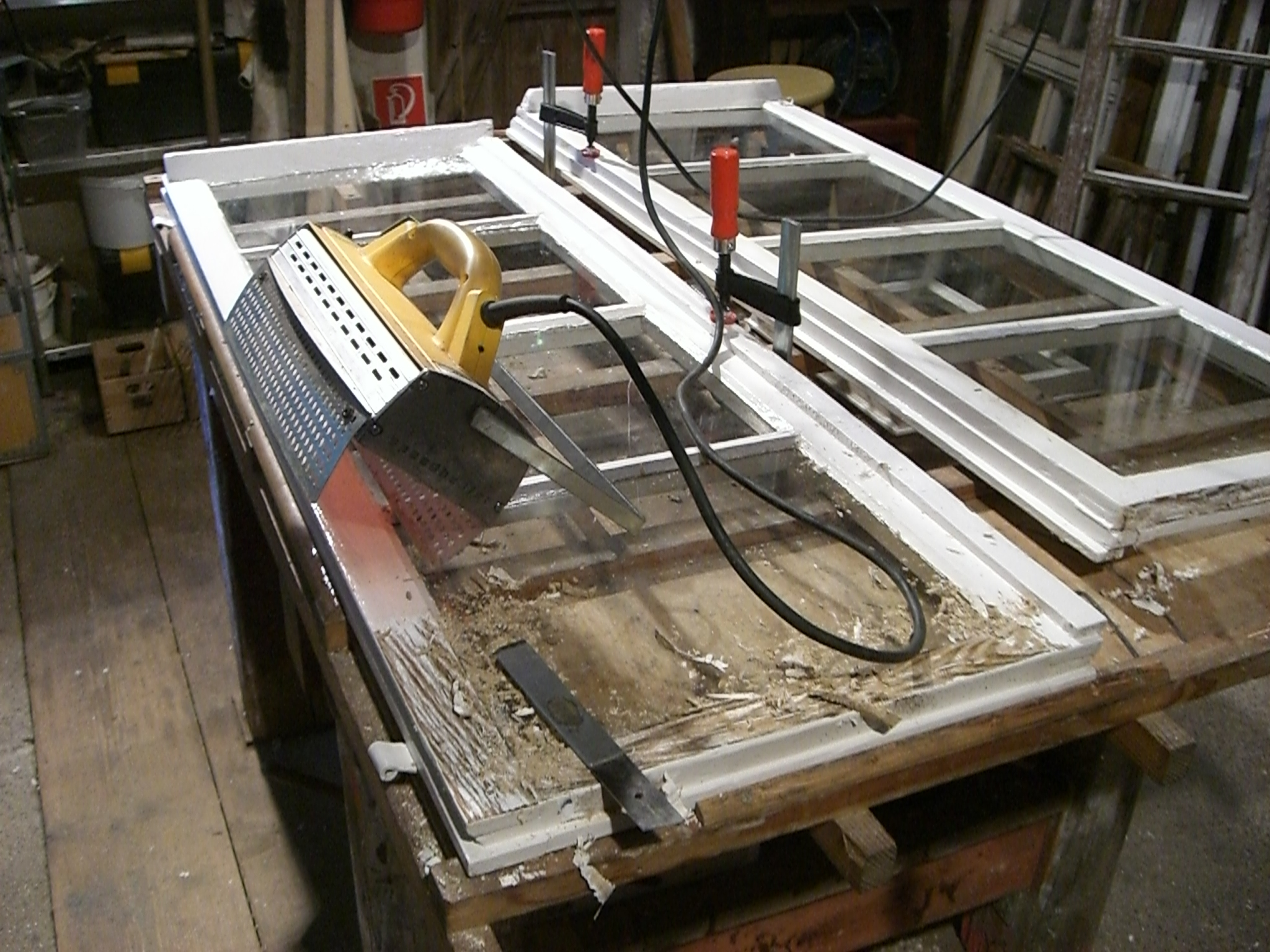 Der alte Kitt wird mit Infrarotstrahlung entfernt.